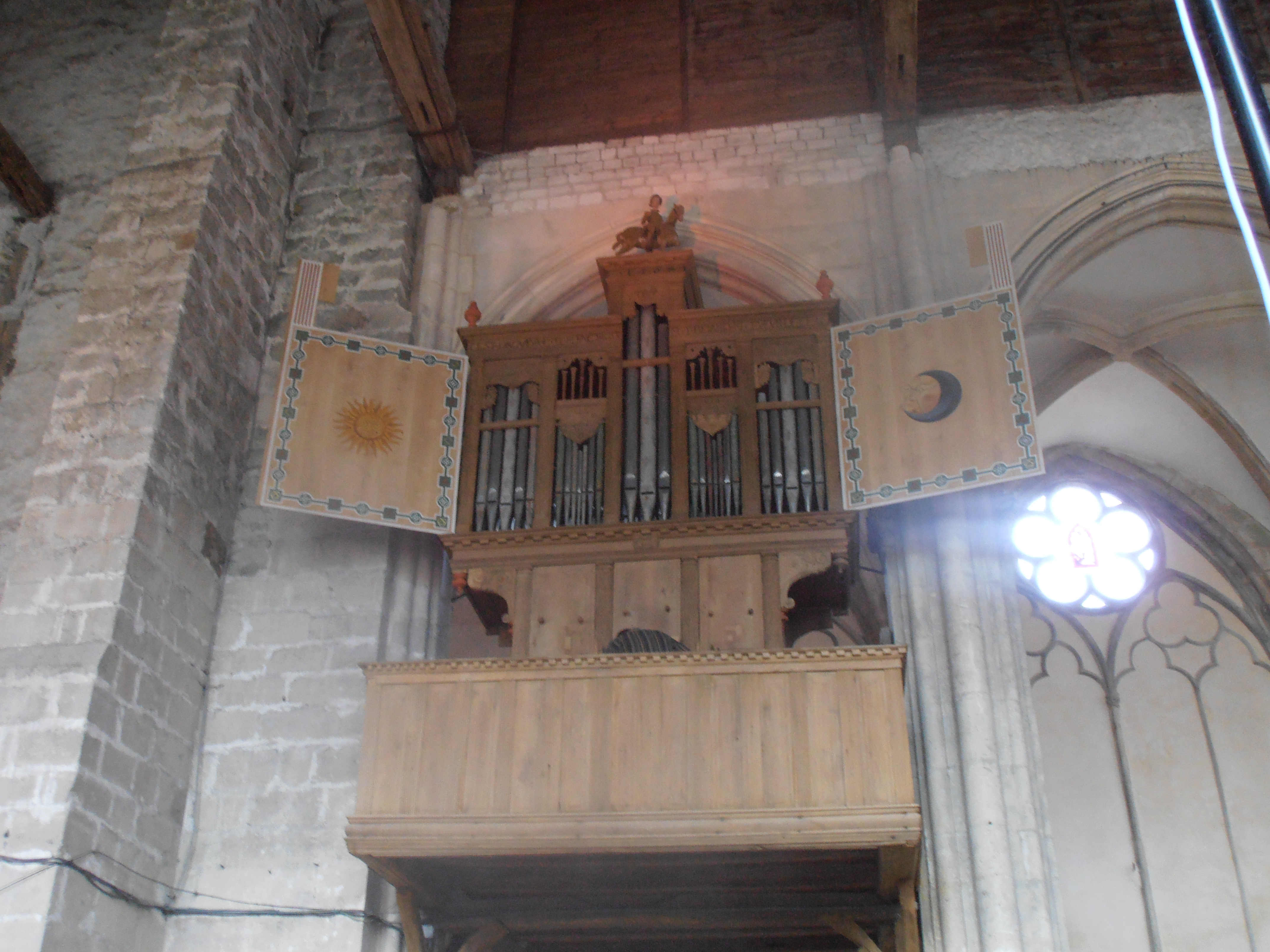 Saint-Julien-du-Sault (Yonne, France), église Saint Pierre, orgue anonyme vers 1568, restauré par Julien Tribuot en 1695 avec ajout d'un demi-clavier d'écho et d'une trompette, réparé par Crochu en 1750, puis en 1843, tuyauterie en partie vandalisée en 1925, reconstitué en 2008 par Bertrand Cattiaux. Volets ouverts.